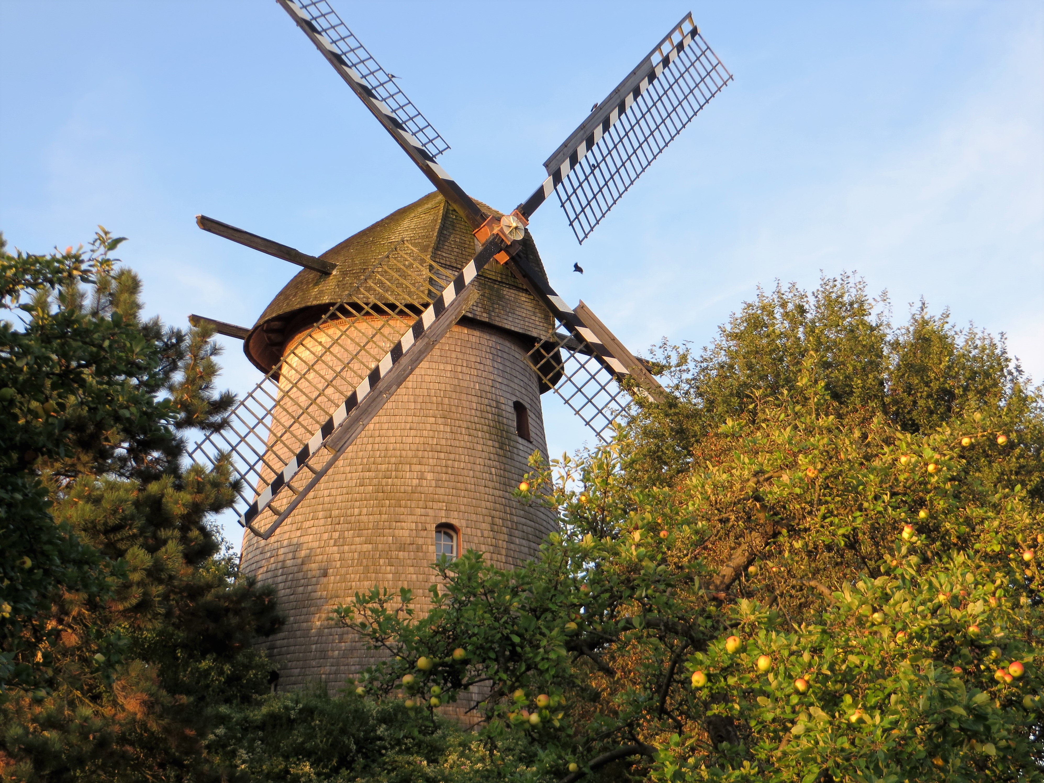 Anholter Windmühle aus dem 18. Jhdt